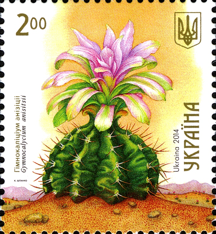 Марка України «Гімнокаліціум анізіціі Gymnocalycium anisitsii»